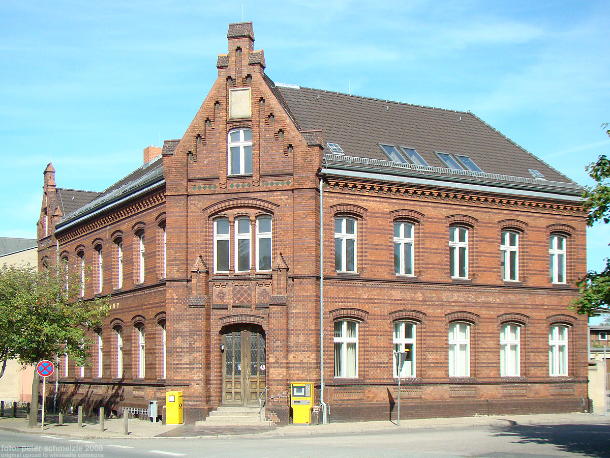 Alte Post in Teterow